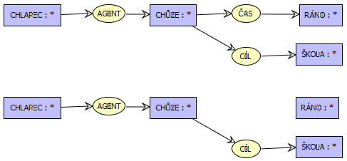 Pravidlo oddeleni - konceptuání graf.